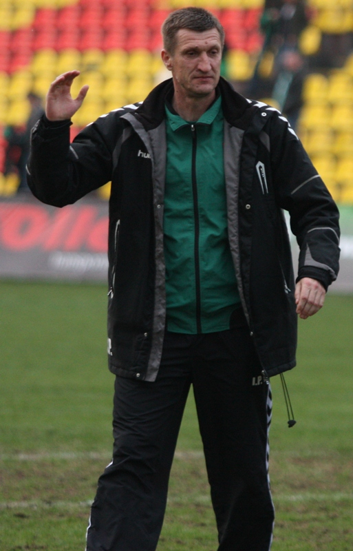 Vilniaus Žalgirio vyriausiasis treneris Igoris Pankratjevas.